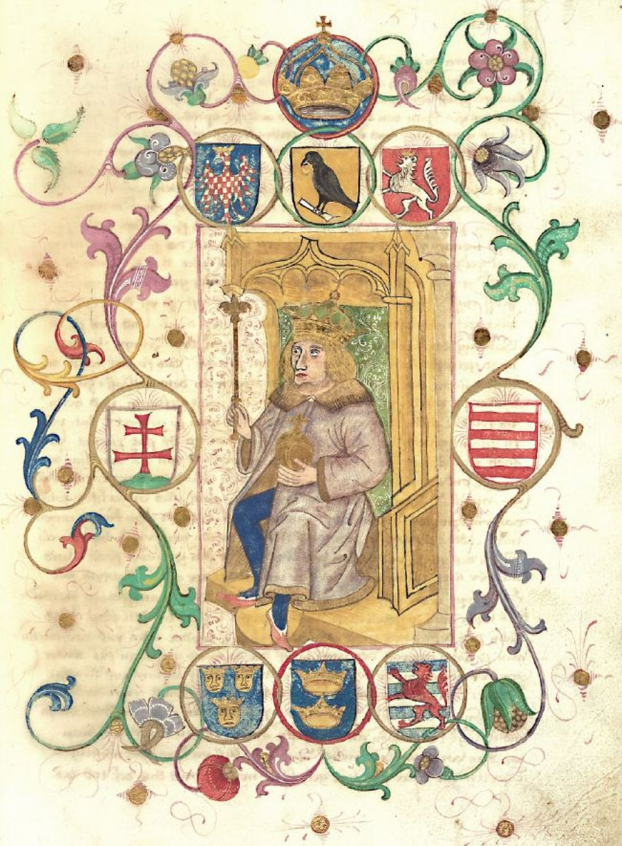 Însemnele heraldice ale lui Matia Corvin prezentate în manuscrisul german al cronicarului ungur Ioannes de Thurocz (Thuróczy János), datat 1490